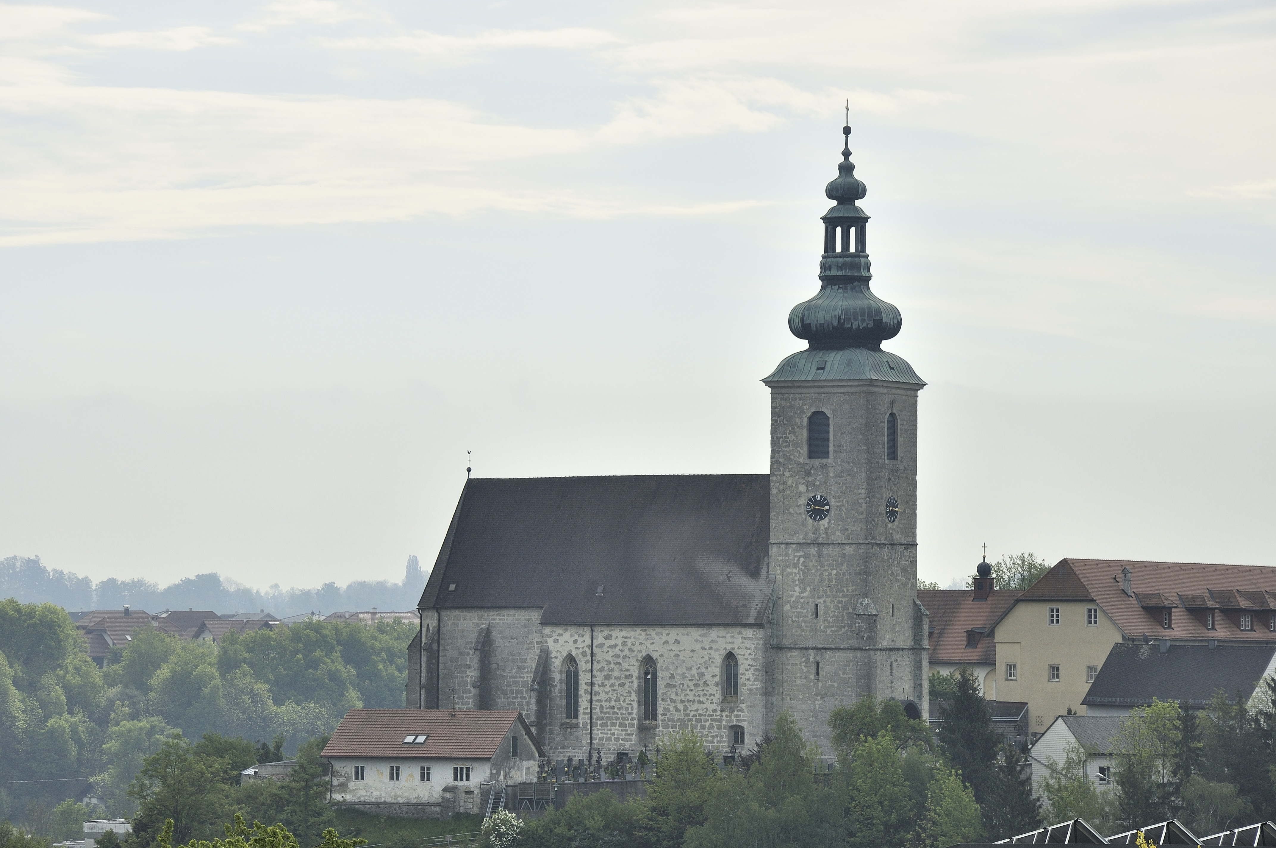 Kath. Pfarrkirche hl. Martin und (ehem.) Friedhof